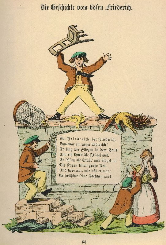 Der Struwwelpeter: Die Geschichte vom bösen Friederich Tafel 1